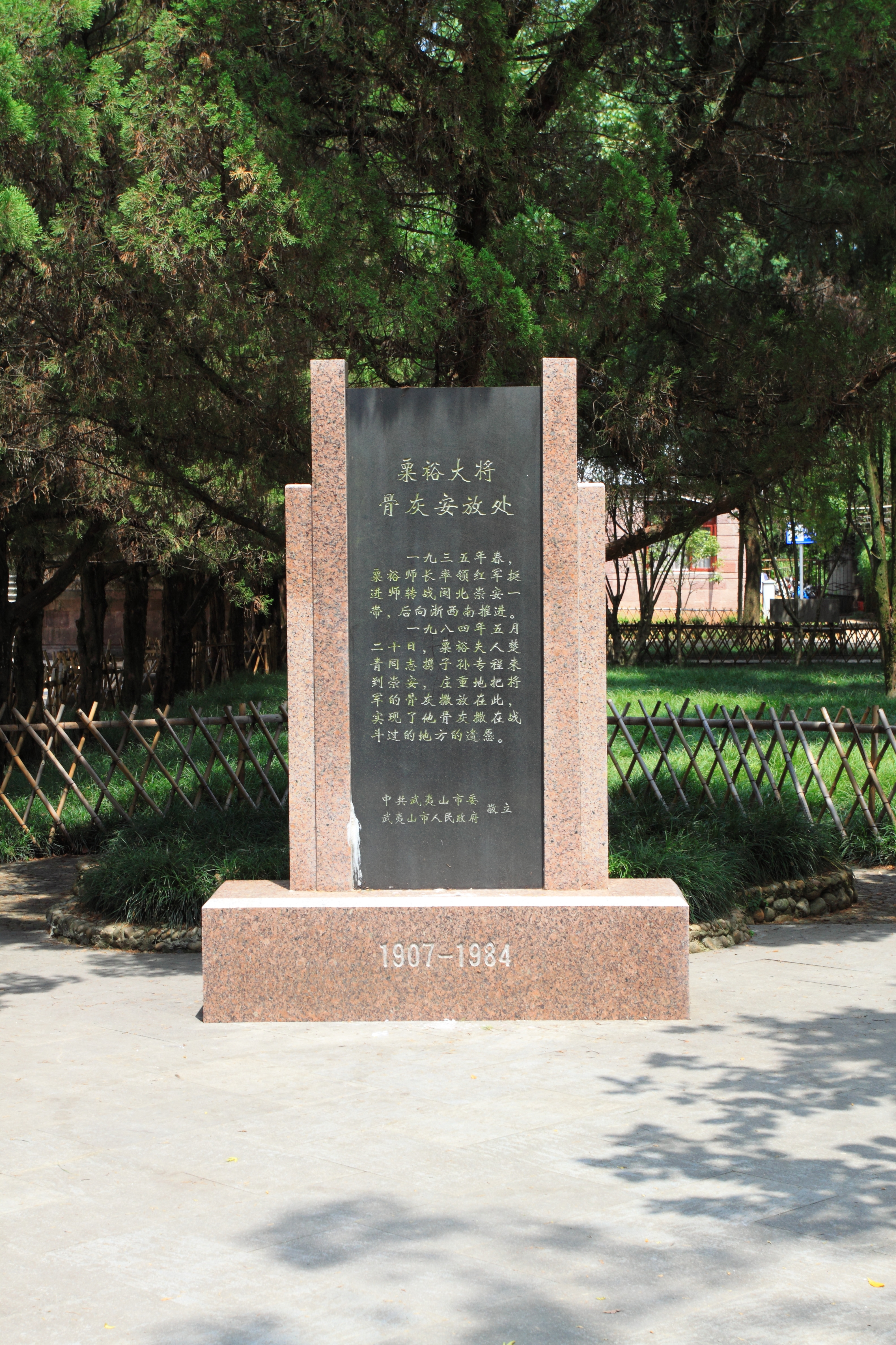 列宁公园，位于中国福建省武夷山市。